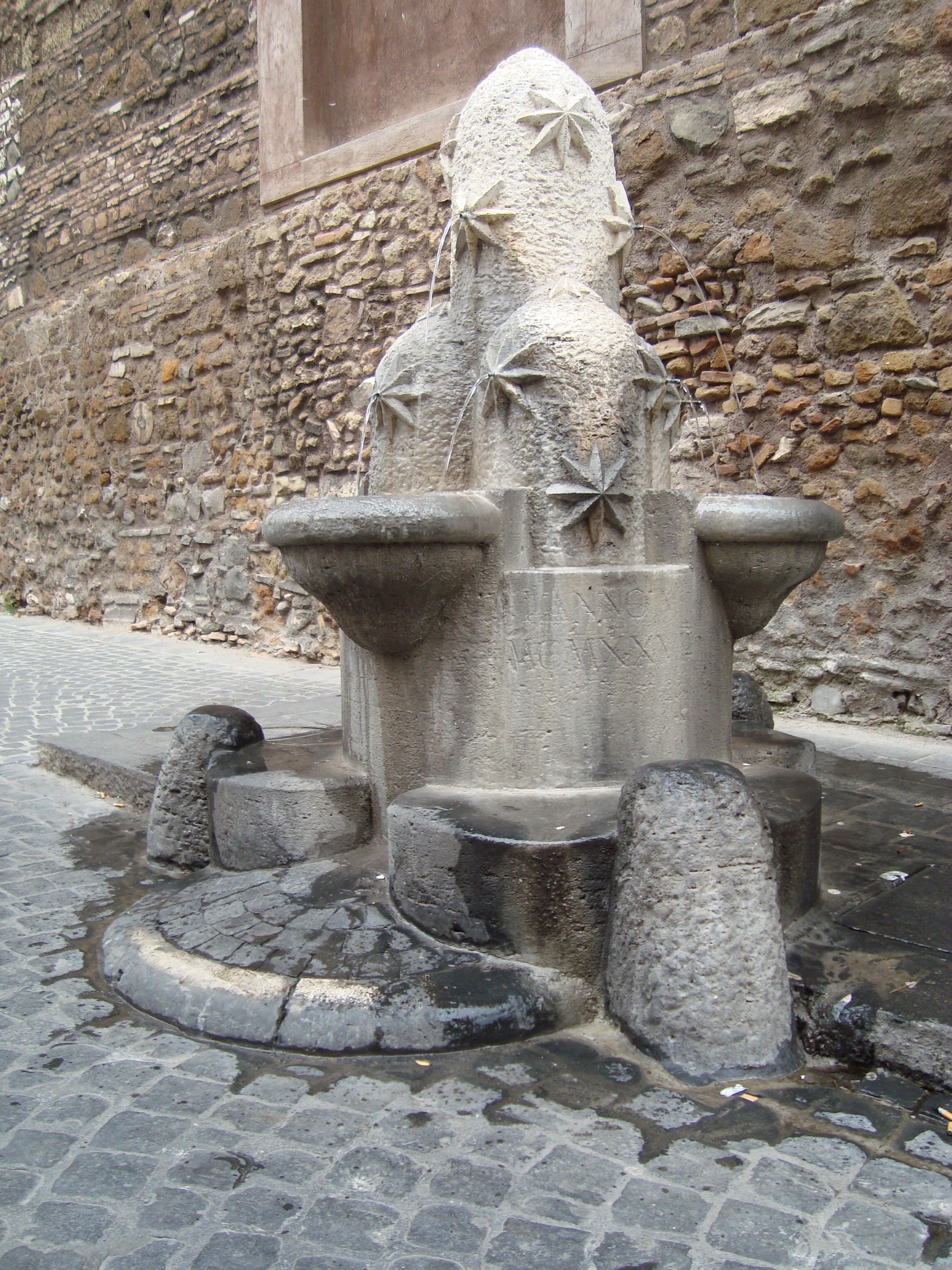 La fontana dei Monti près de l'église san vito et modesto de Rome